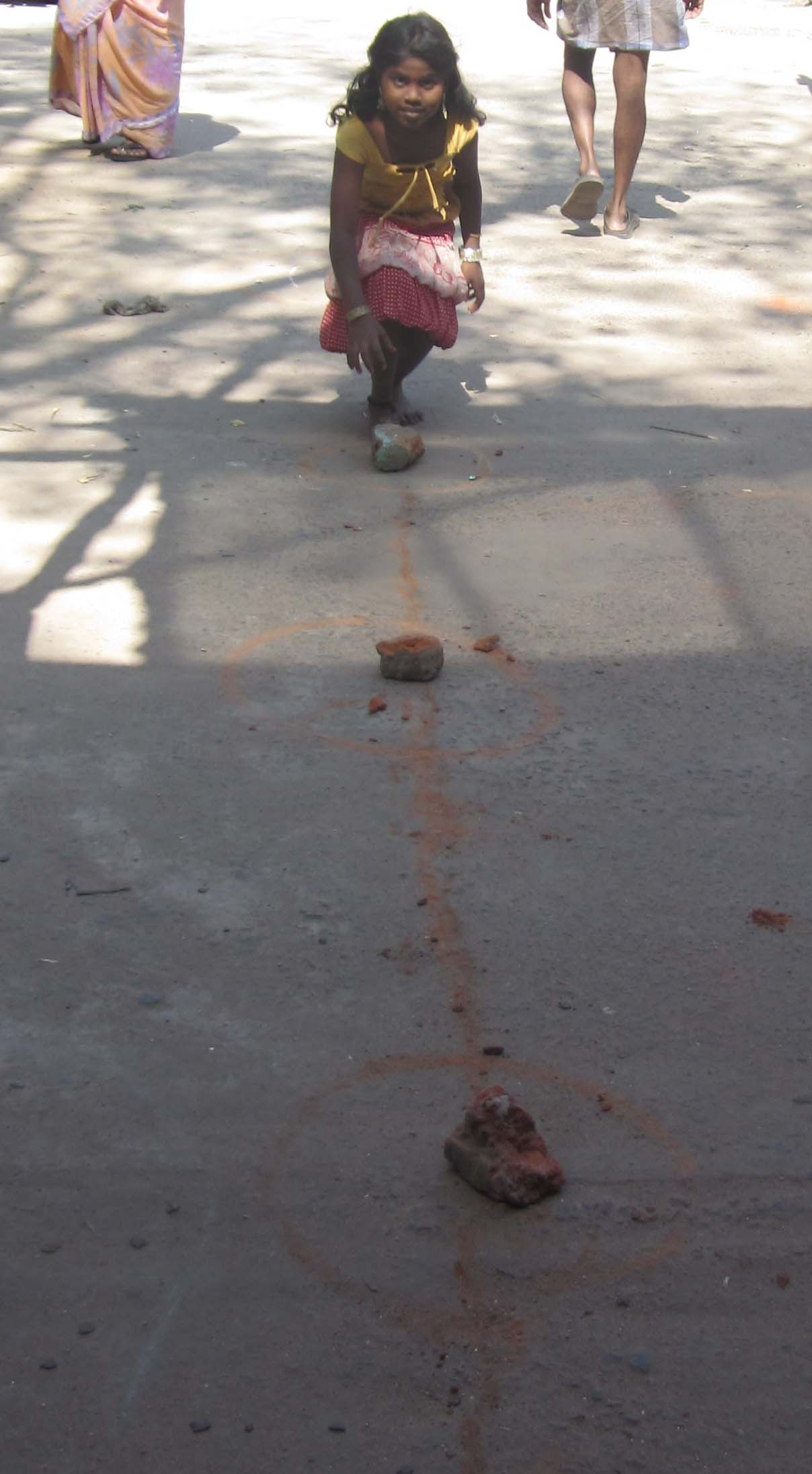 கல் எடுத்தல் விளையாட்டு